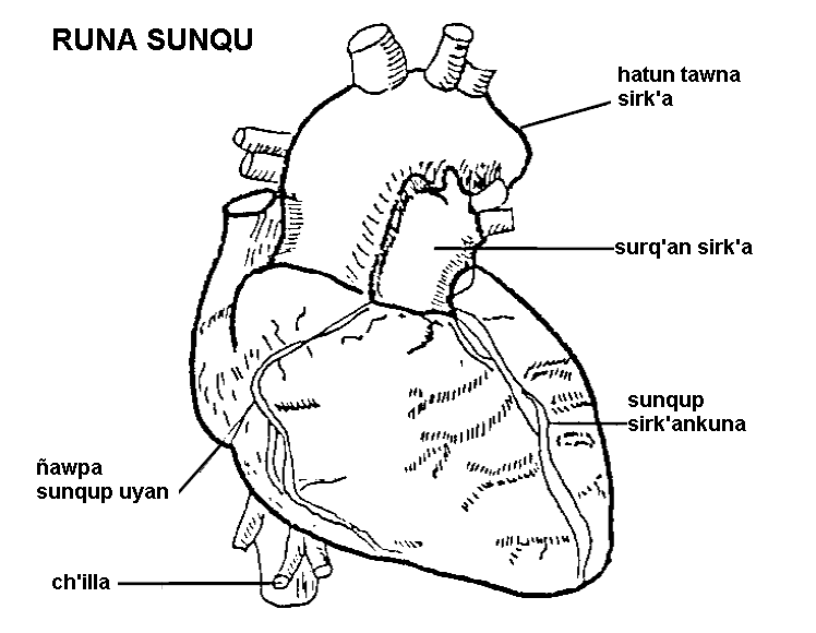 Runa Simi: Runap sunqun